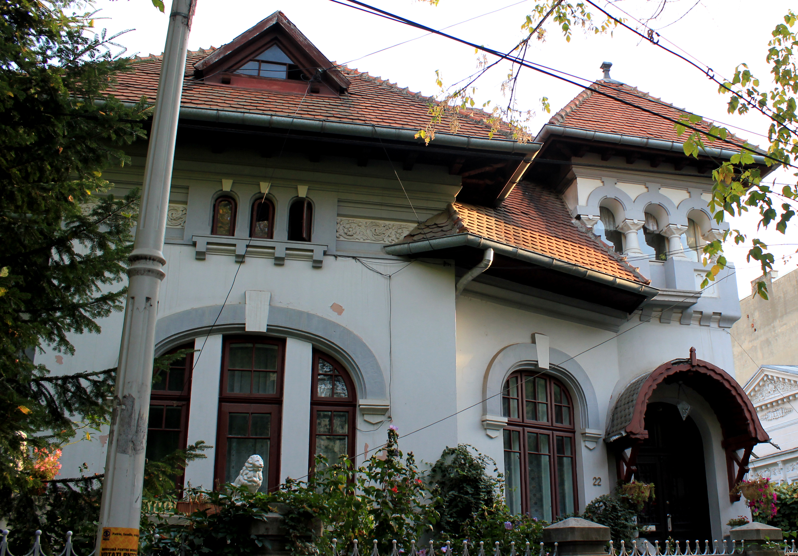 Casa Romano Alexandru 22